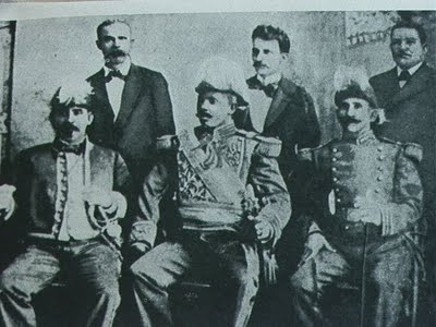 El ex presidente y dictador dominicano del siglo XIX Ulises Heureaux en 1893.